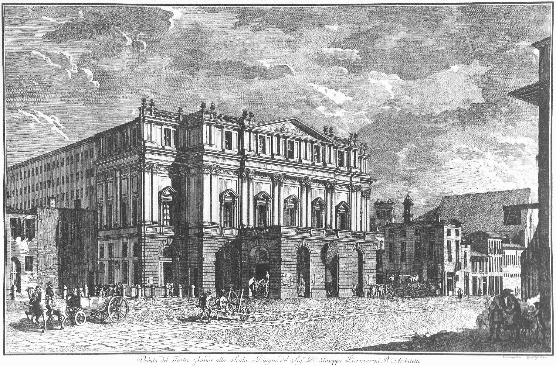 "veduta del teatro grande alla Scala" disegno e incisione di Domenico Aspar (1790)